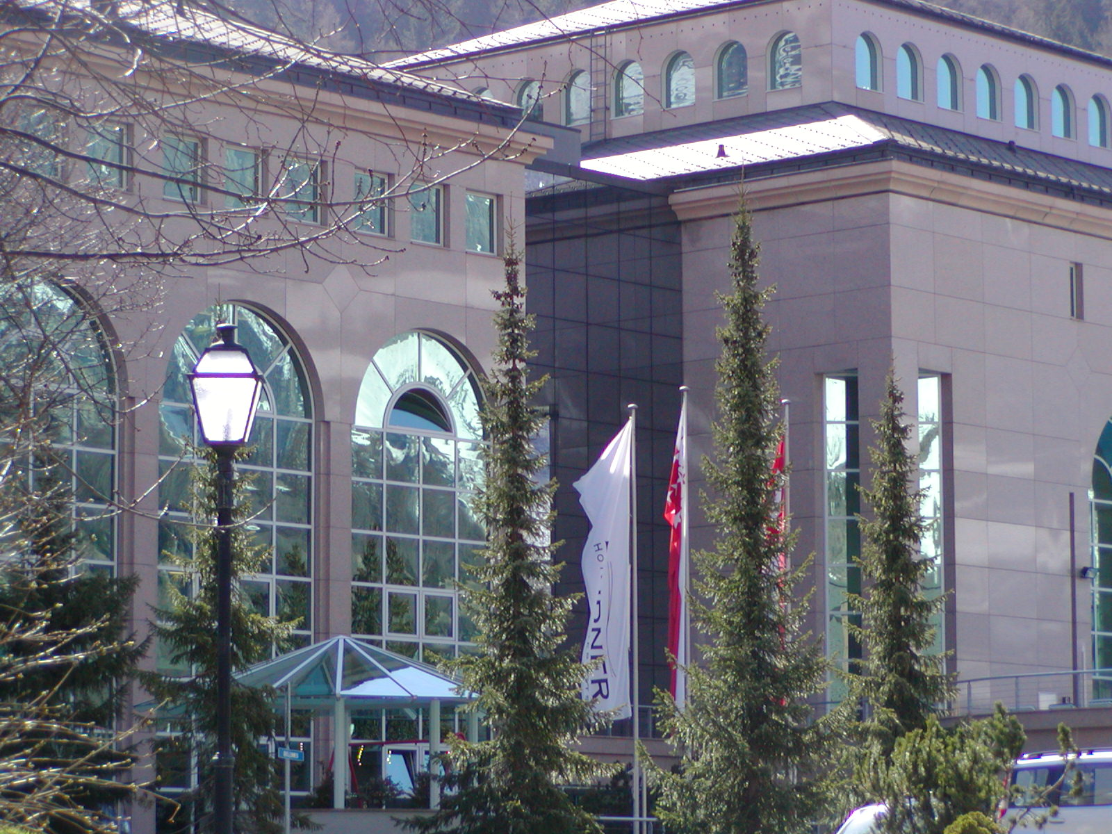 lindner